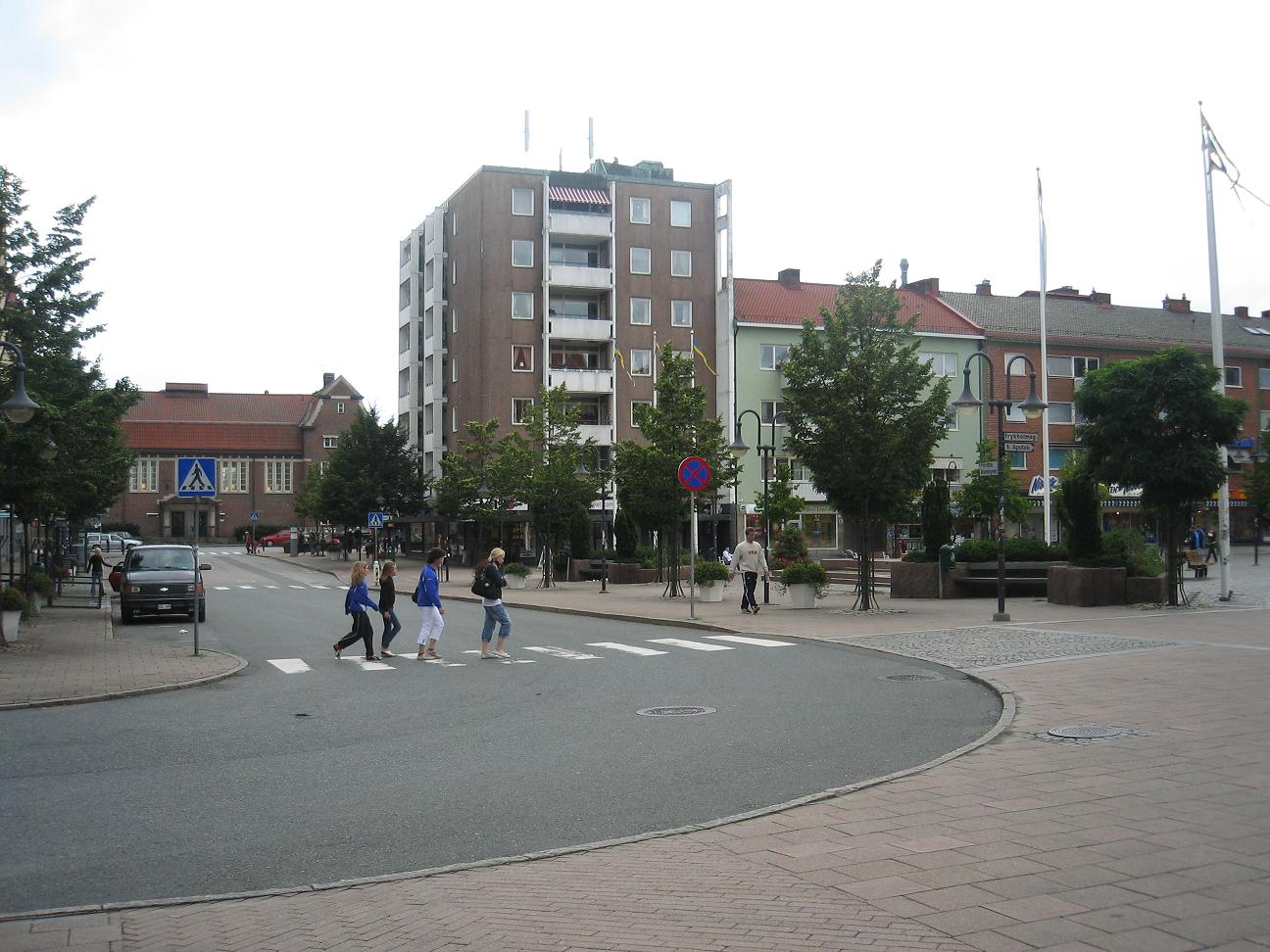 (Bild tagen i Hässleholm över Stortorget och Hässleholms järnvägsstation)